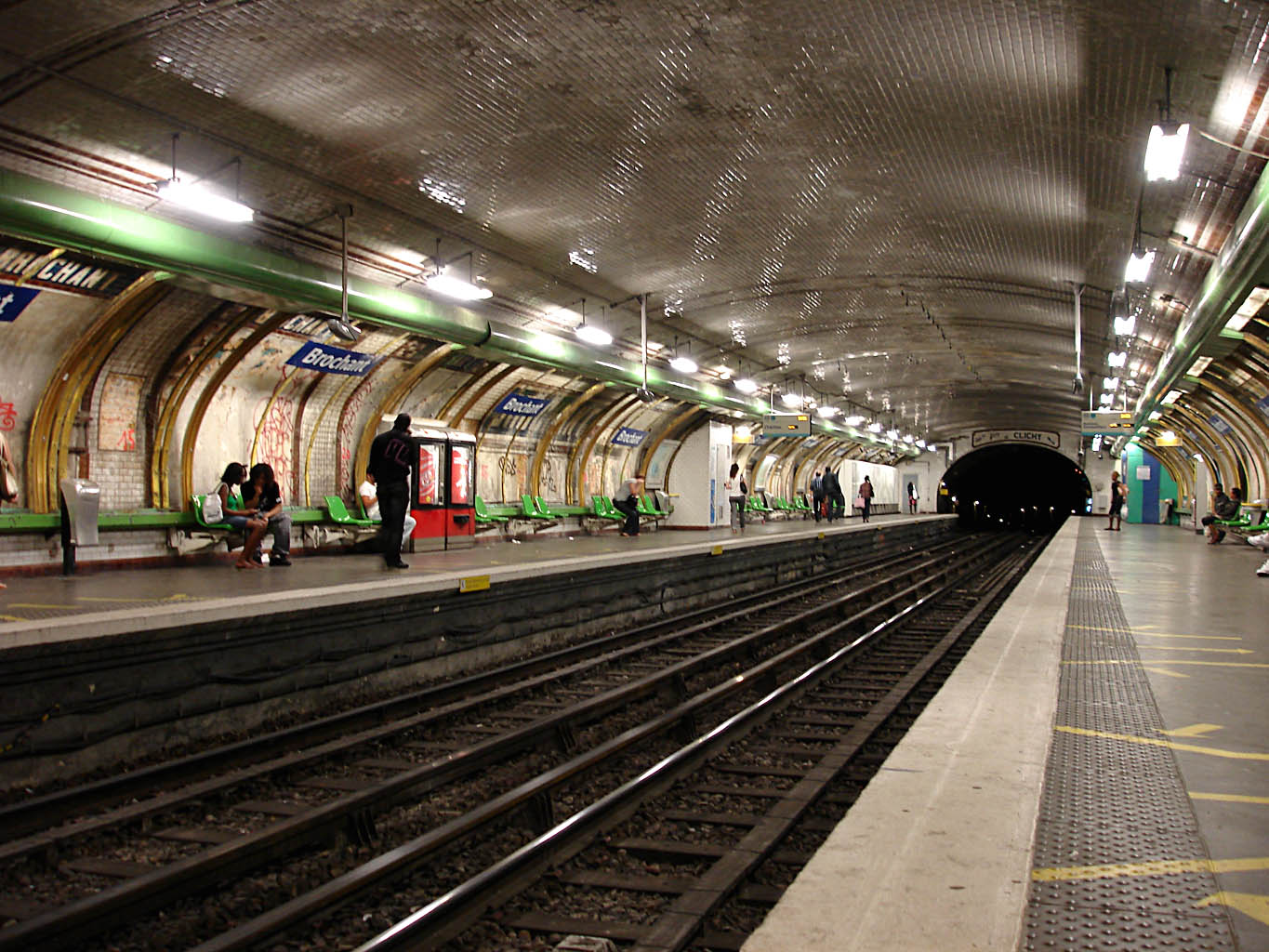 Station Brochant, de la ligne 13 du métro de Paris, France.